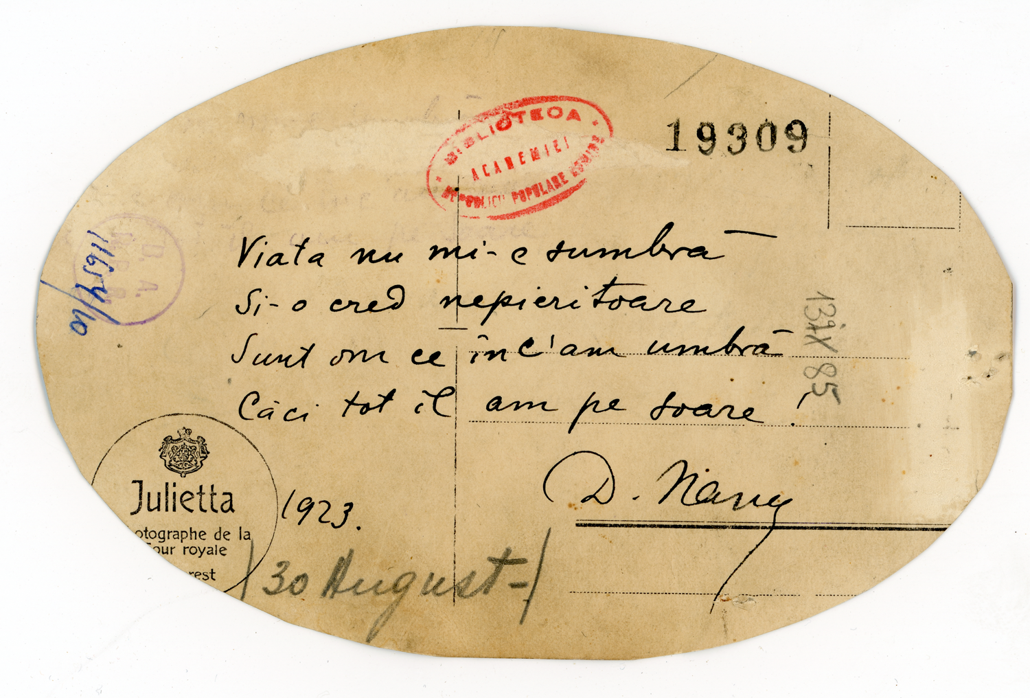 Carte postala cu portretul lui Dumitru Nanu, verso, cu patru versuri, semnate.